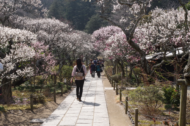 参道の紅梅白梅。